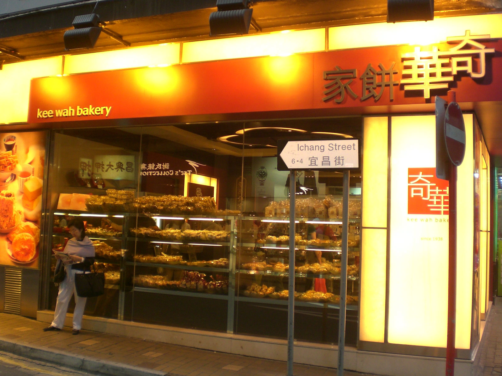 九龍尖沙咀宜昌街, IChang Street, TST, Hong Kong